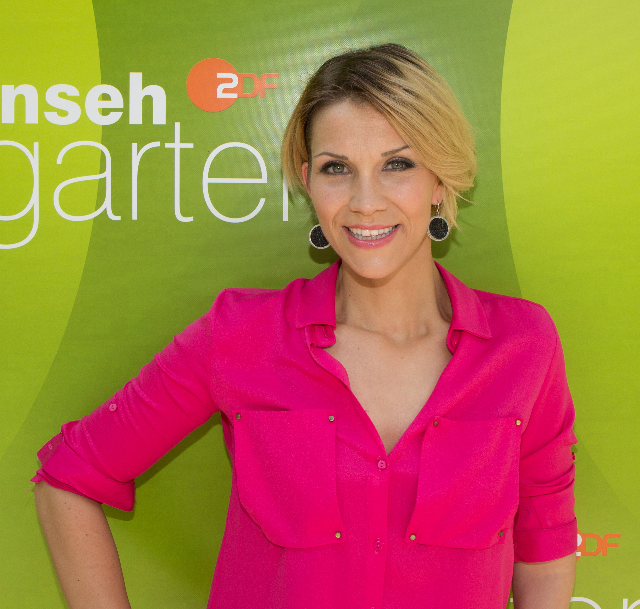 Anna Maria Zimmermann als Gast beim ZDF-Fernsehgarten am 10. Juni 2018 in Mainz.